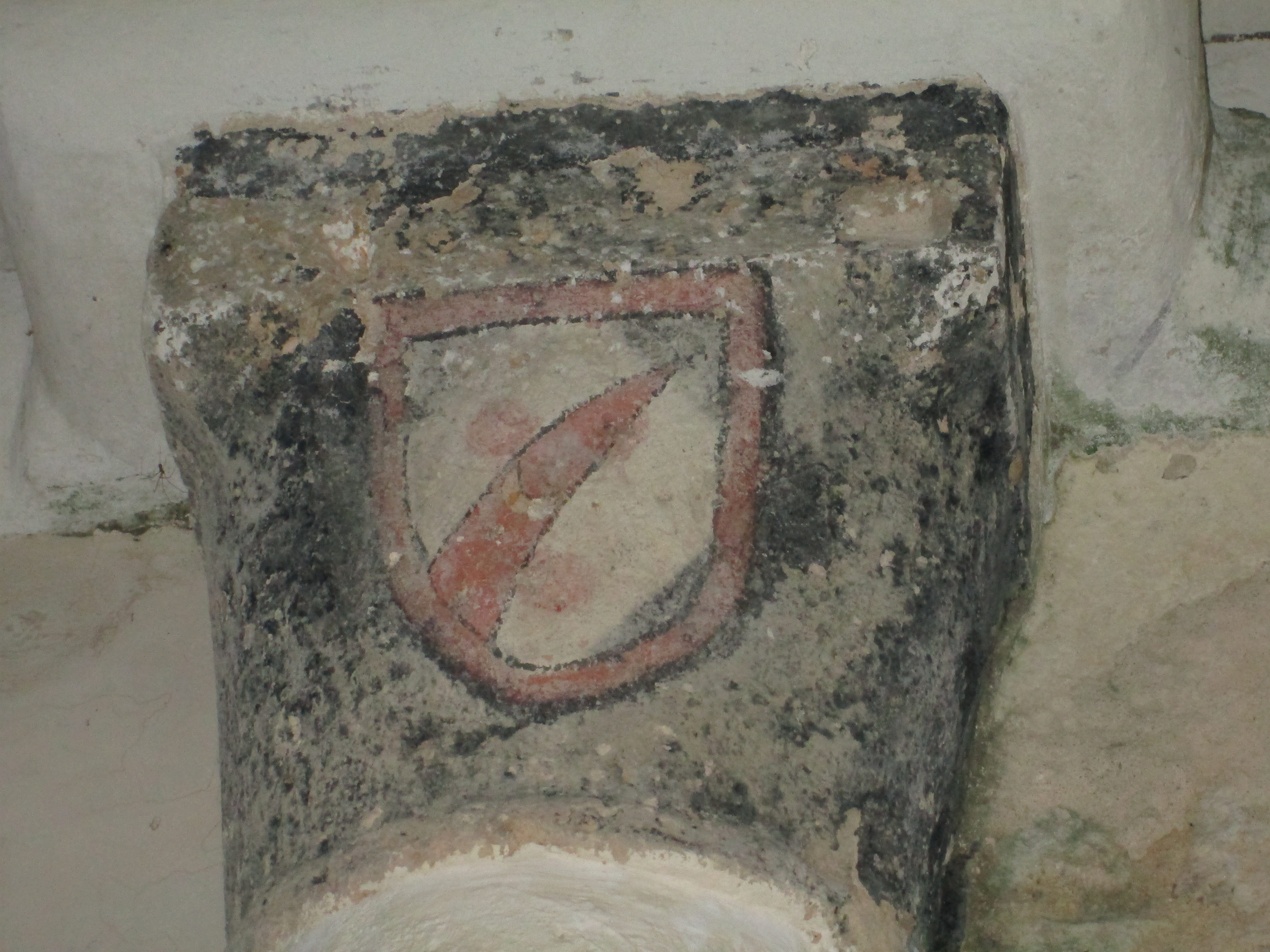 Armoiries dans l eglise ste madeleine, videix